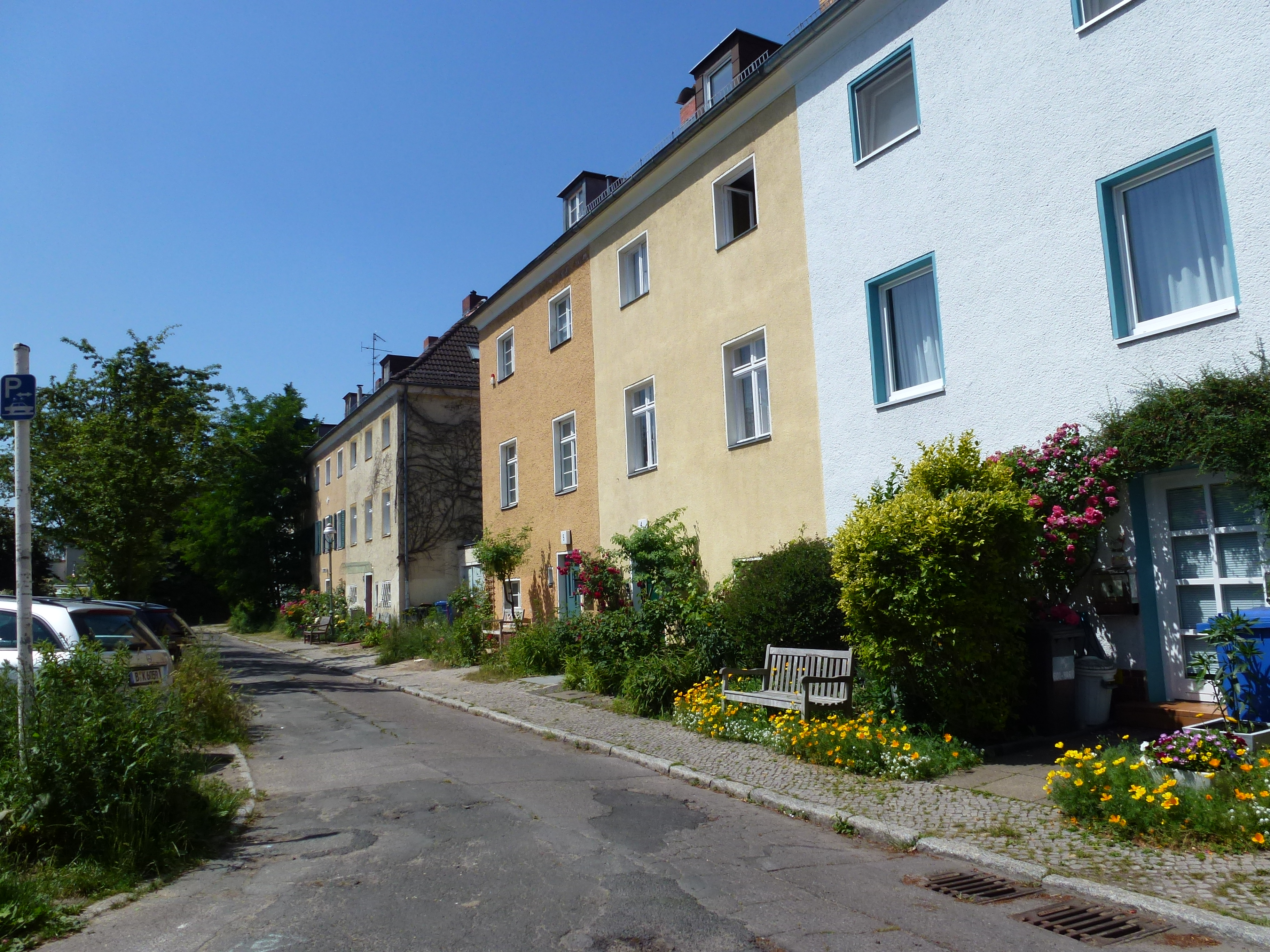 Berlin-Tempelhof Wiesenerstraße